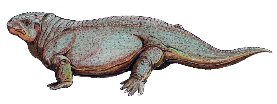 Diadectes